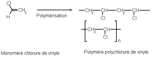 Auteur Pulko Citron